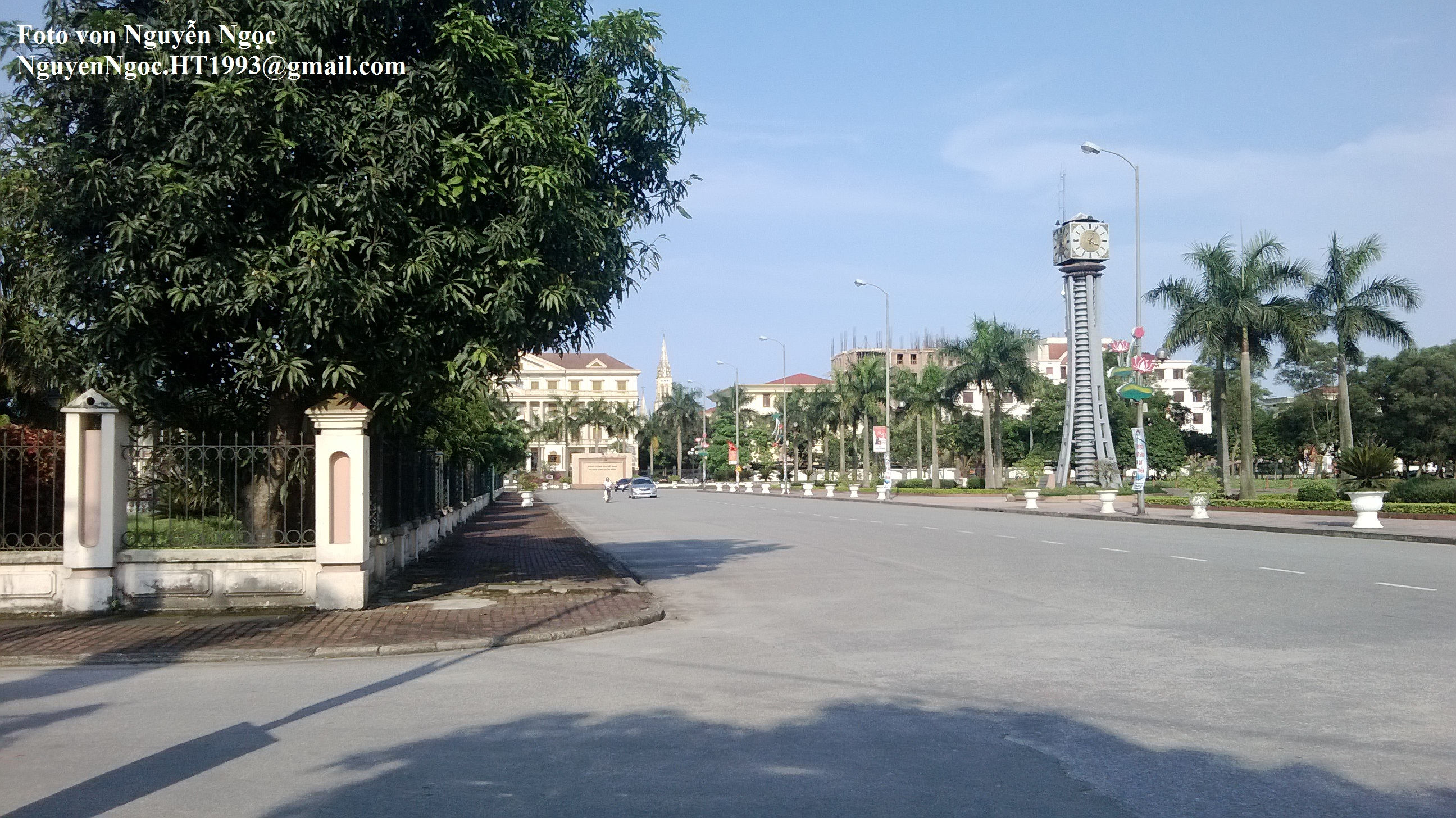 Quảng trừơng Hà Tĩnh